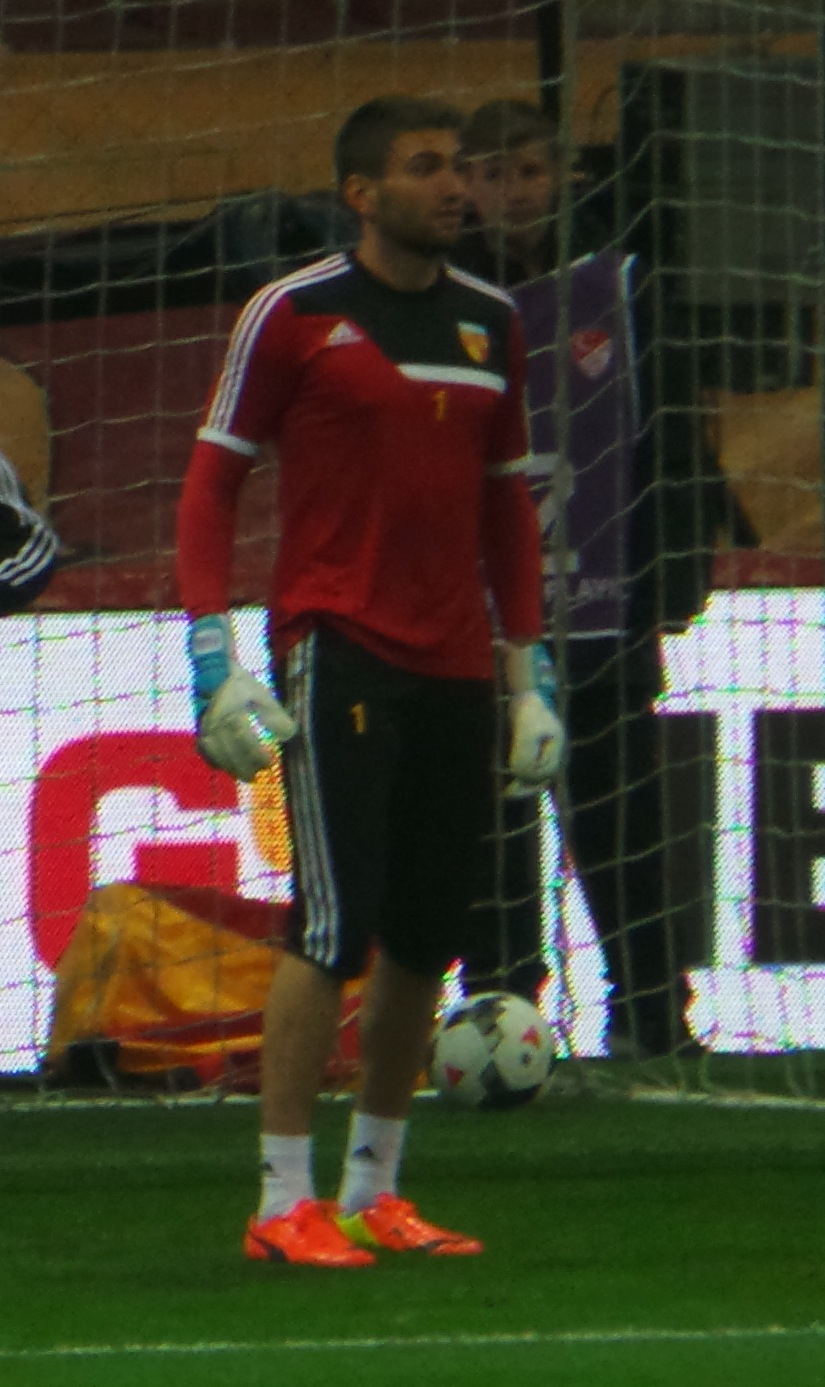 Ertuğrul Taşkıran